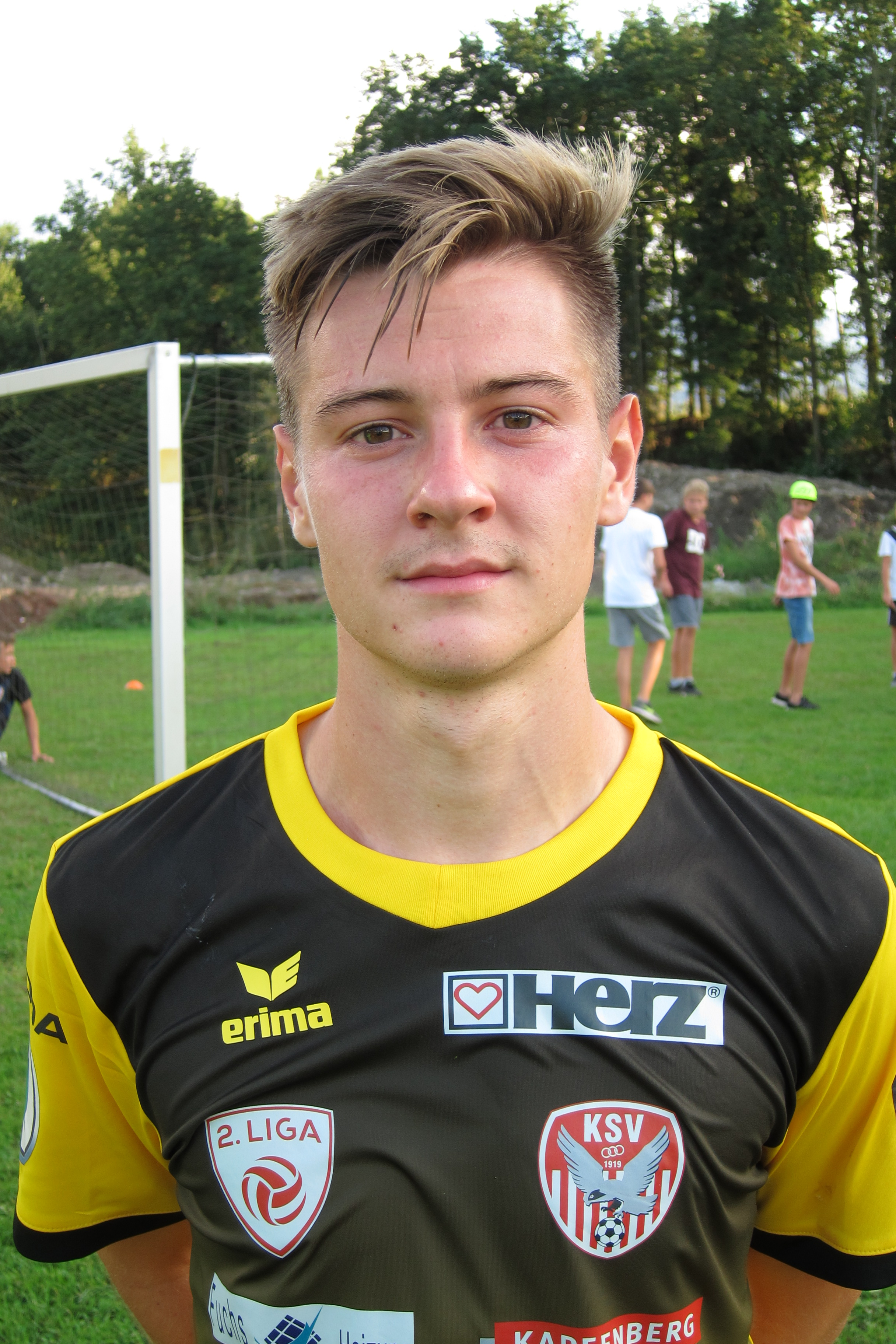 Daniel Racic (KSV)